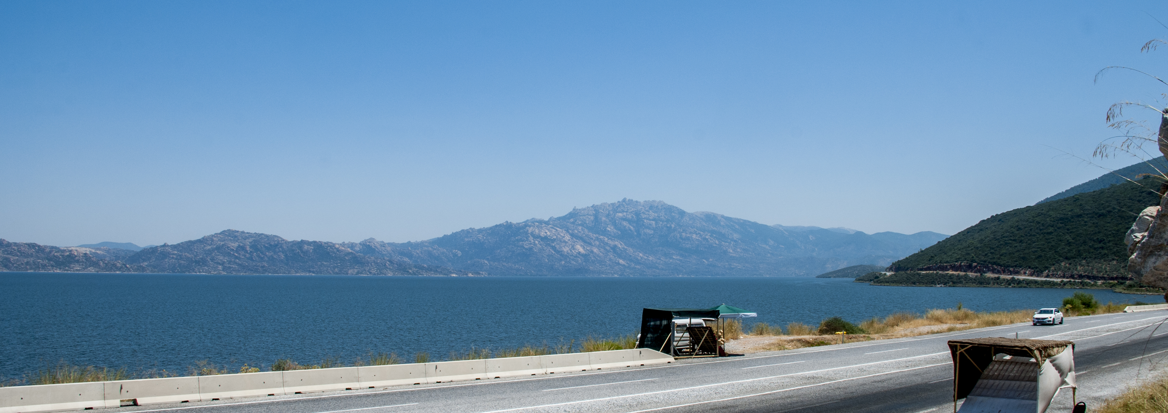 Bafa Gölü ve Latmos Dağı